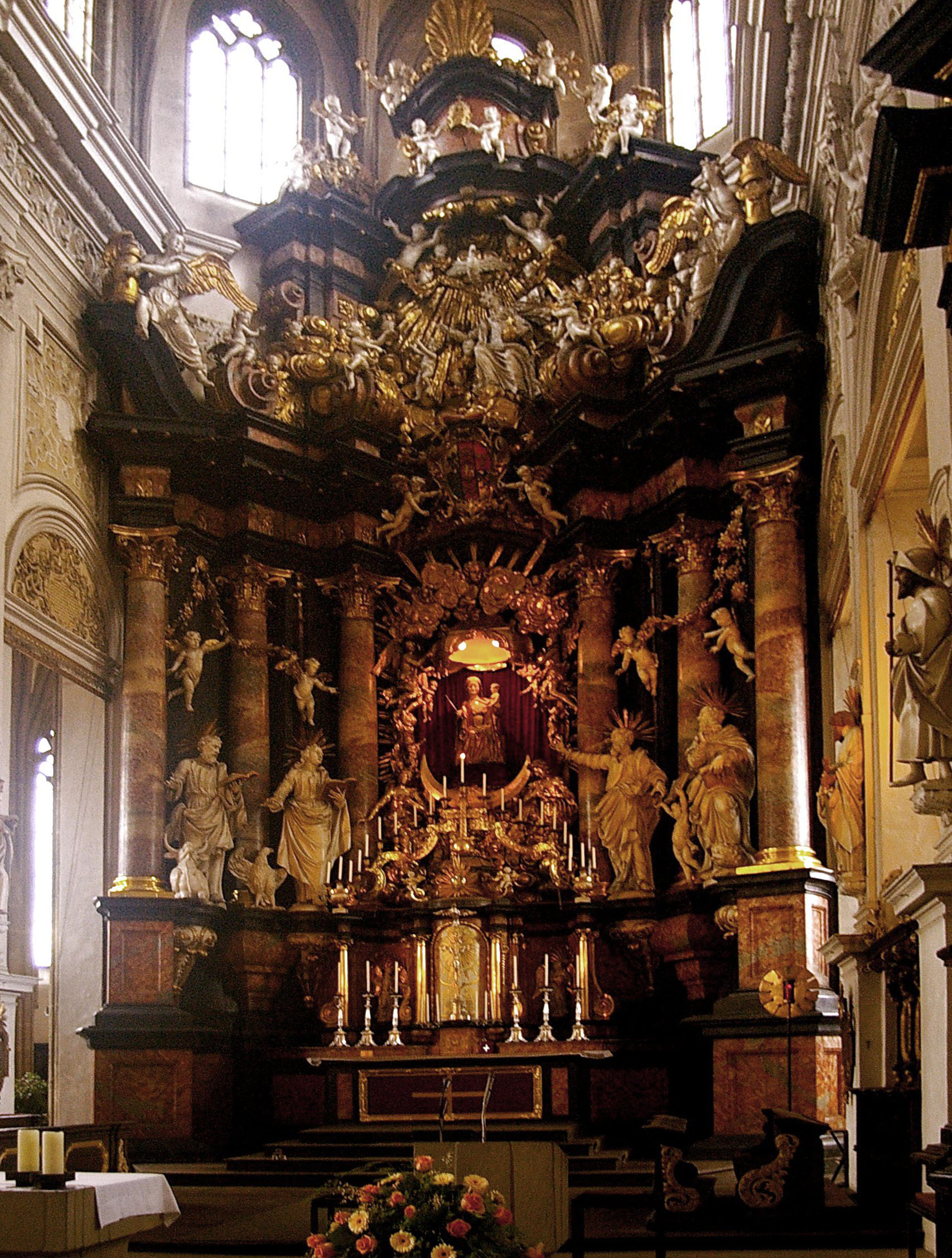 Bamberg - Obere Pfarre - Altar